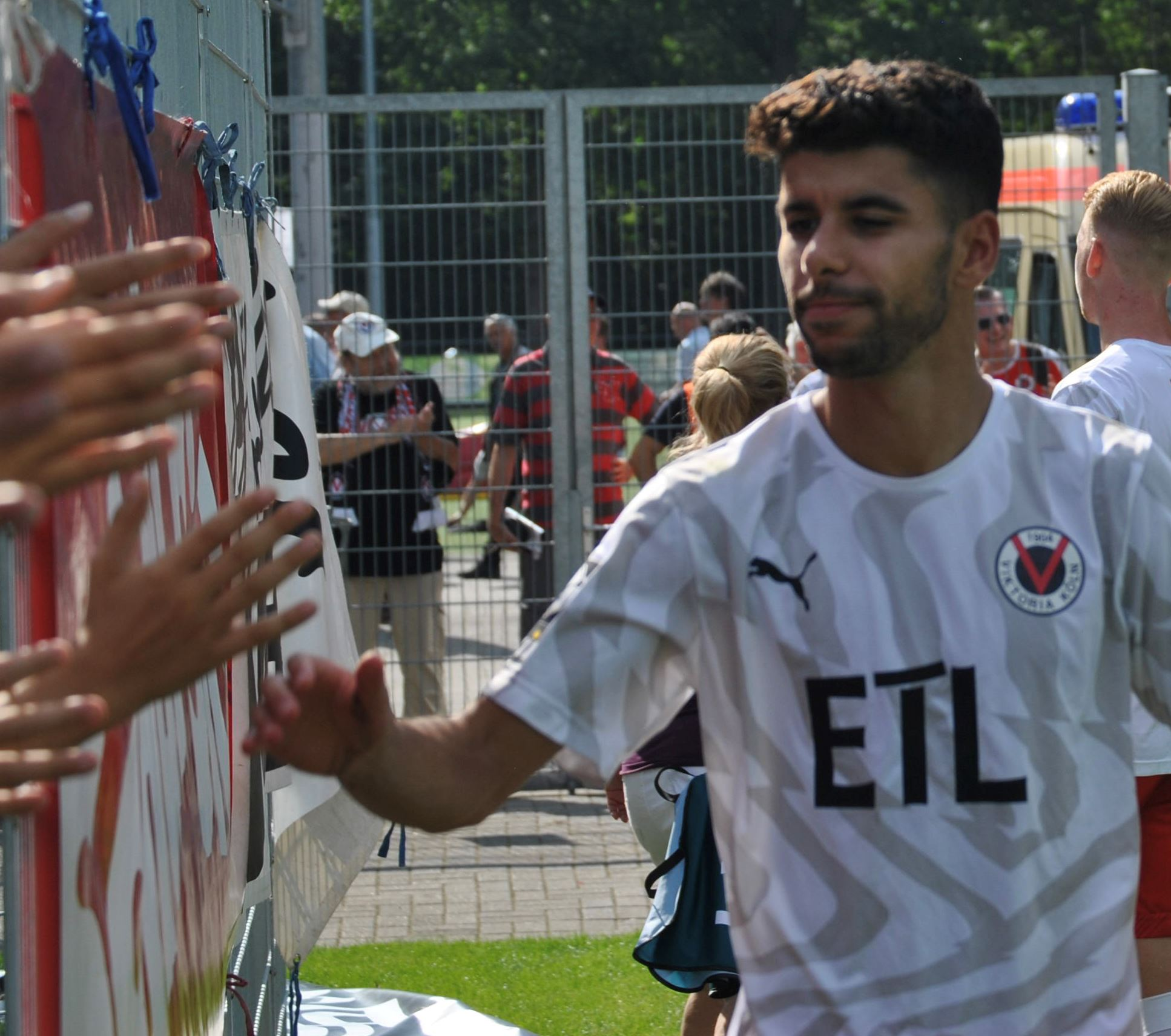 Hamza Saghiri (Viktoria Köln) am 31.8.2019 nach dem Spiel gegen Ingolstadt